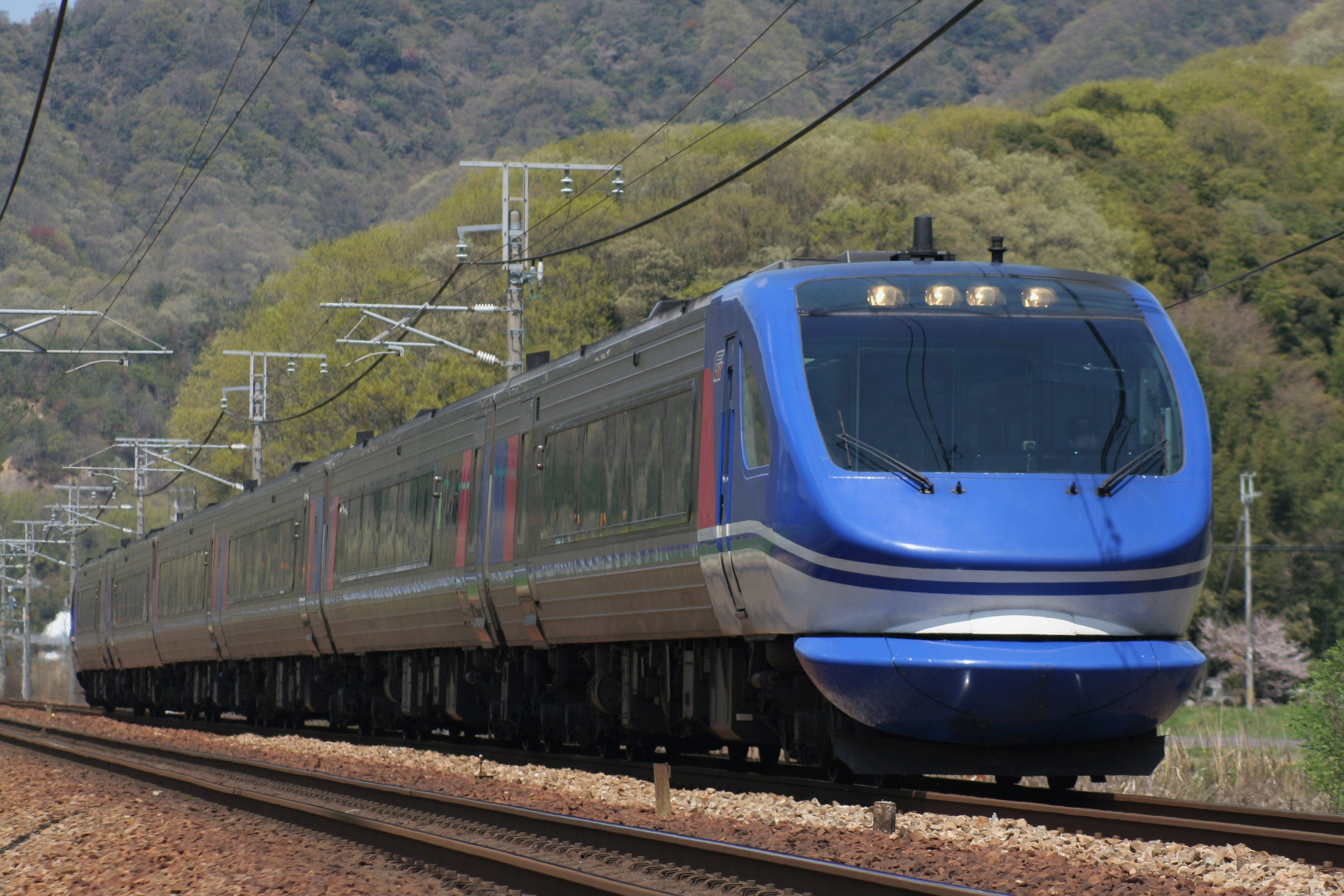 智頭急行 HOT7000系気動車 山陽本線、上郡 - 有年